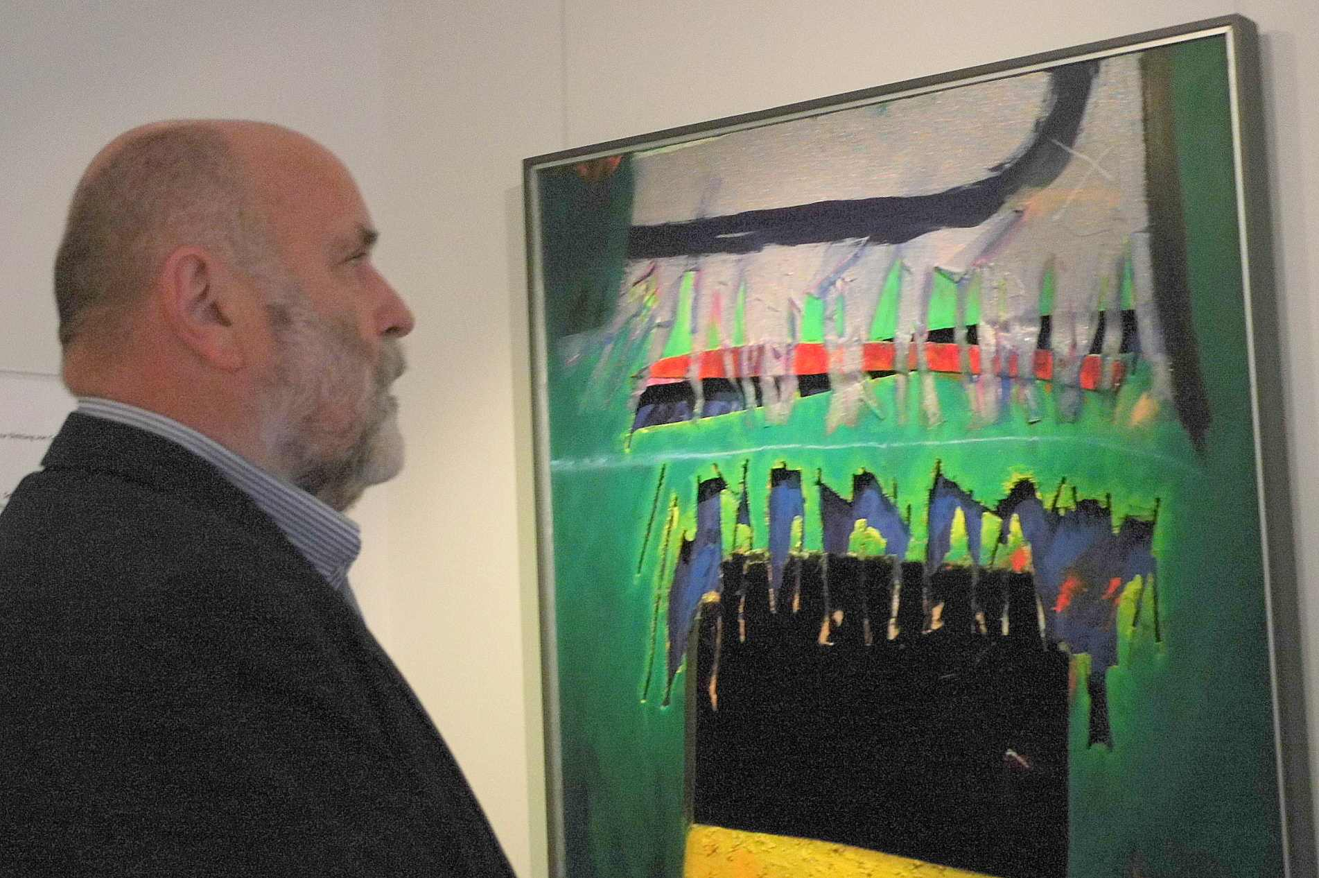 Appold in Apolda